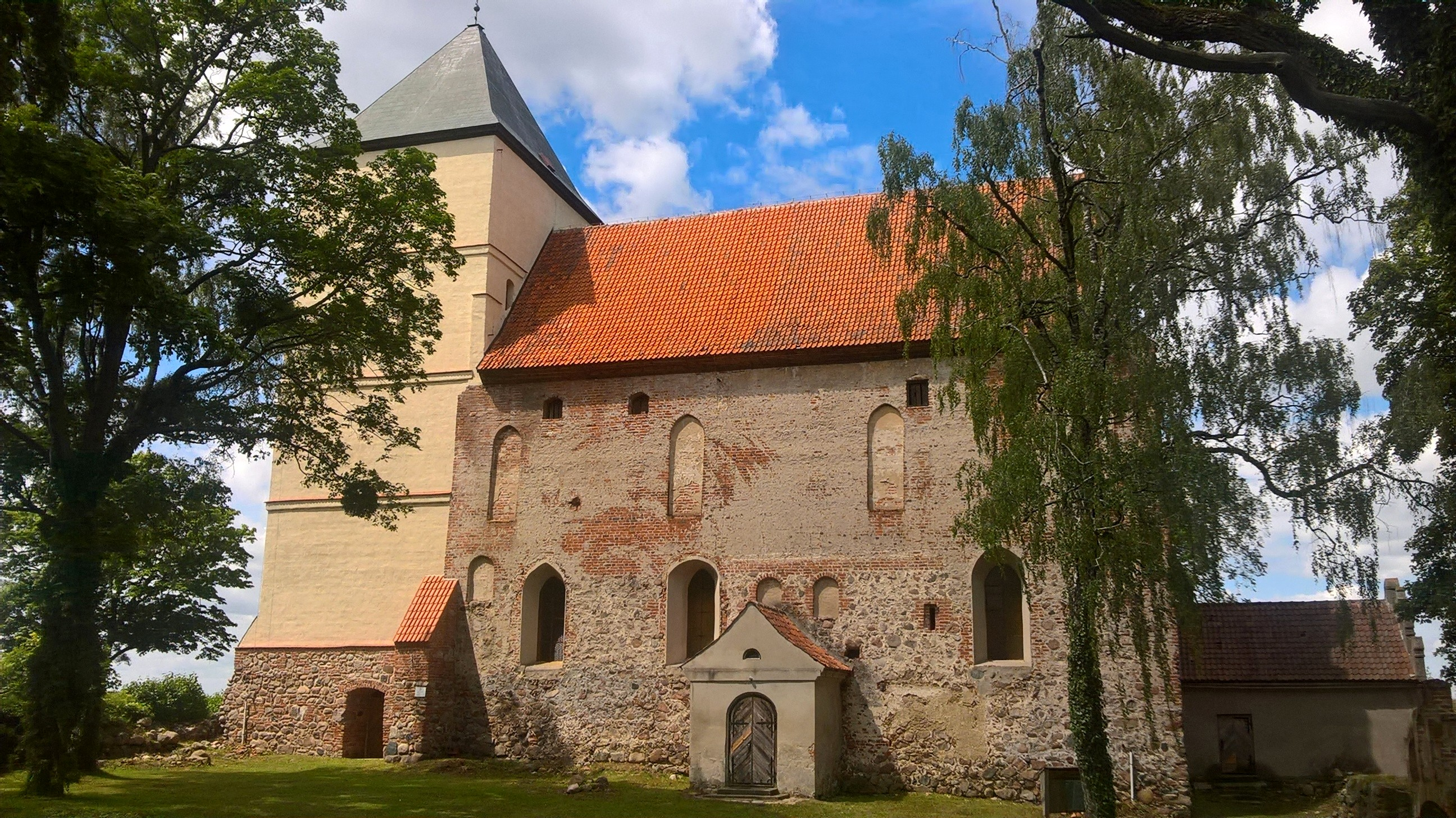 Zamek krzyżacki (kościół ewangelicki) w Bezławkach w 2017 r.